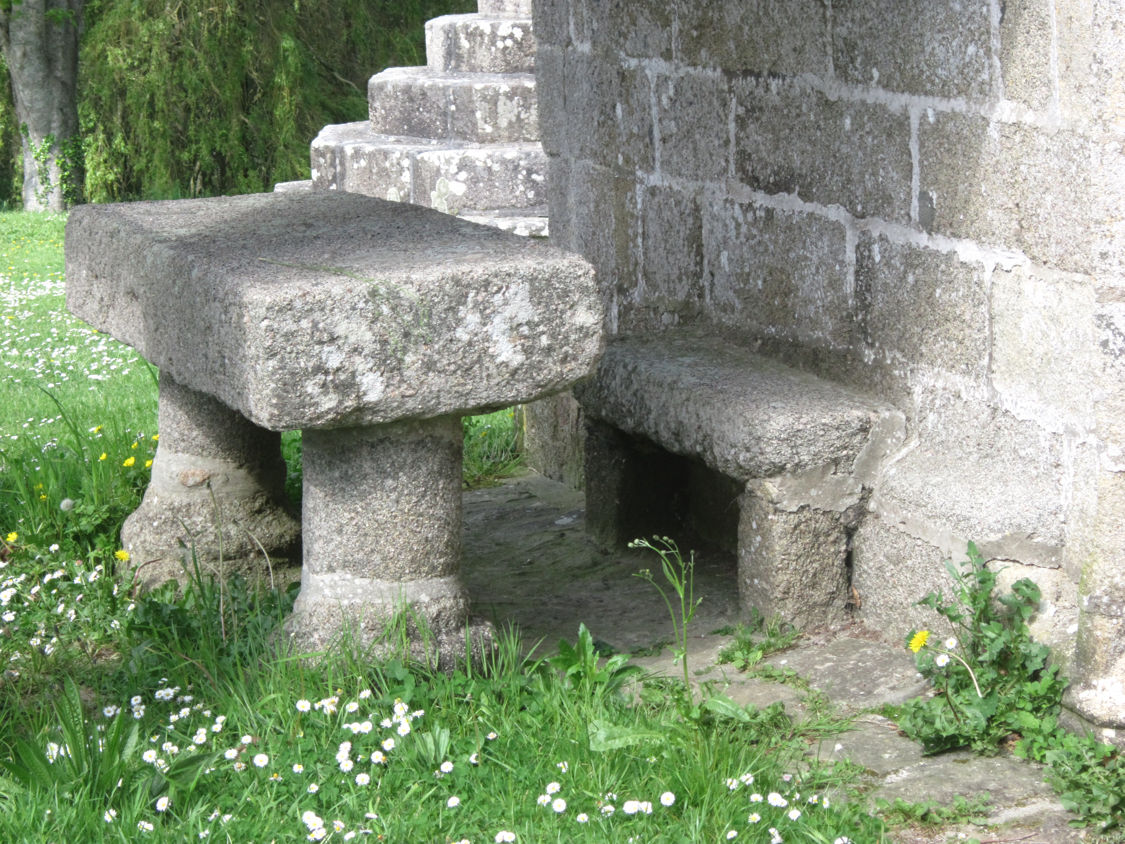 Plouarzel, chapelle Saint-Éloi : table de granite servant à déposer les offrandes des cavaliers les jours de pardon (située sous un abri à l'avant de la façade de la chapelle). Les cavaliers mettent pied à terre, déposent une offrande (crin de cheval, beurre, avoine, ..) sur la table de pierre et tournent trois fois autour de la chapelle en tenant leurs chevaux par la bride.